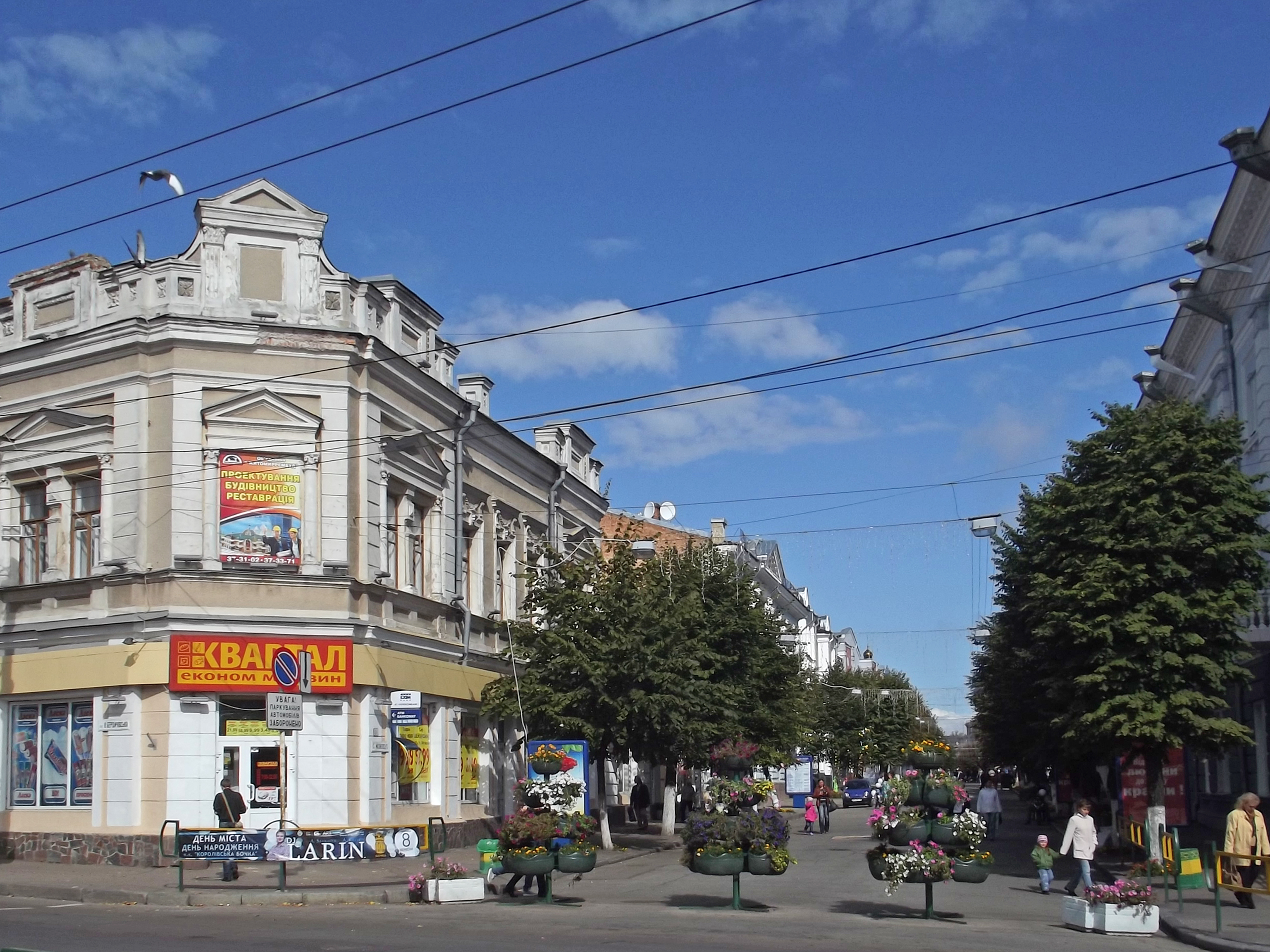 Пешеходная Михайловская улица